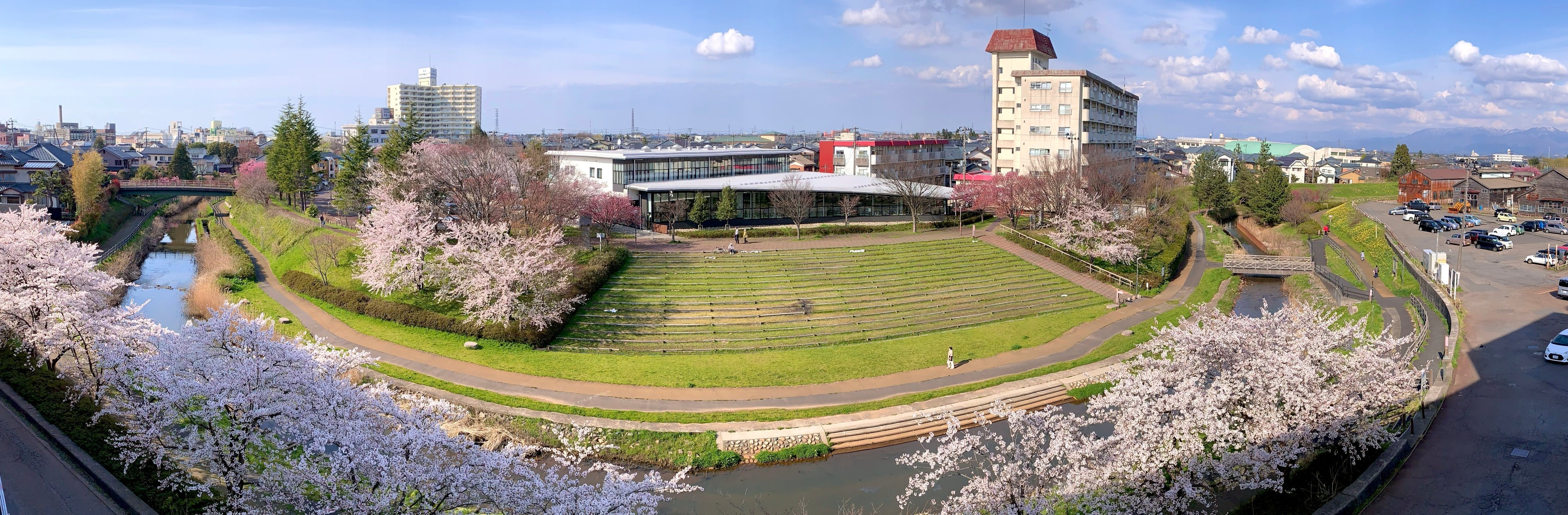 新津川と新津図書館（2020年4月）